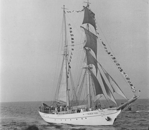 Segelschulschiff "Wilhelm Pieck" Segelschulschiff "Wilhelm Pieck" Die zukünftigen Kapitäne, Steuerleute und Maate unserer Handelsflotte werden auf der schmucken Zweimaster-Schonerbrigg "Wilhelm Pieck" in einem 10-wöchigen Lehrgang ausgebildet. Die Schüler, die aus allen Teilen der DDR kommen und der Interessengemeinschaft für Wassersport der Freien Deutschen Jugend angehören, lernen unter Anleitung des erfahrenen Kapitäns Weitendorf, der vier Offiziere und einer 10-köpfigen Stammannschaft mit grosser Begeisterung die Bedienung des Segelschiffes. Sie wissen, dass der Tag eines einheitlichen Deutschlands nicht mehr fern ist und freuen sich darauf, mit unseren Handelsschiffen alle Meere befahren zu können. Was sie gelernt haben, werden sie dann erst richtig beweisen können. UBz: Noch kreuzt die lernende Jugend mit ihrer Zweimaster-Schonerbrigg in der Ostsee, bald aber werden junge Kapitäne, Steuerleute, und Maate unsere ersten Handelsschiffe über den Atlantik und Stillen Ozean führen. Zentralbild-Sturm 27.12.1951